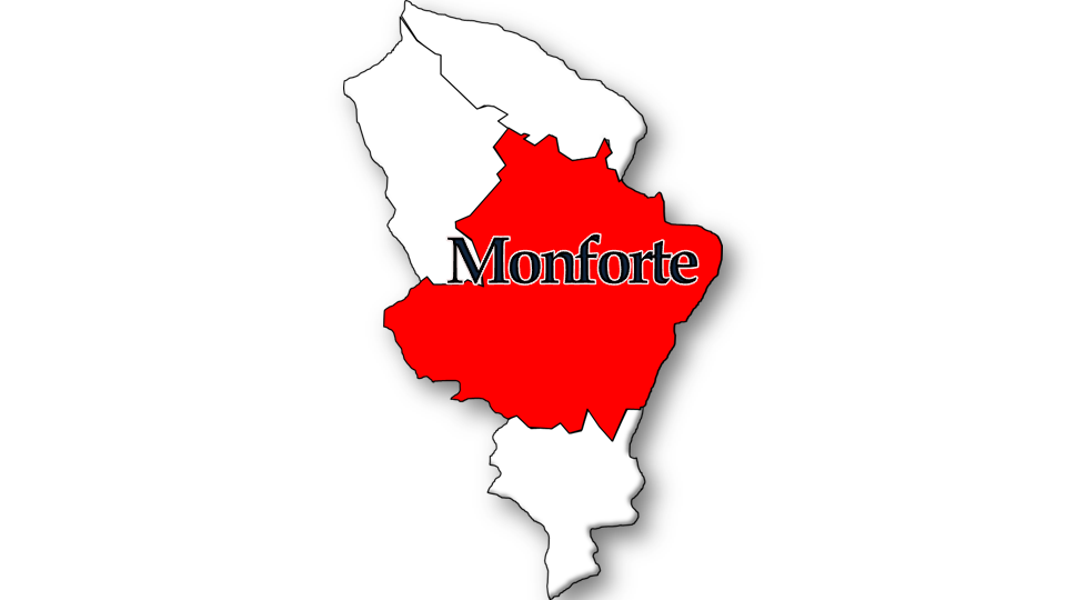 Evolução da População